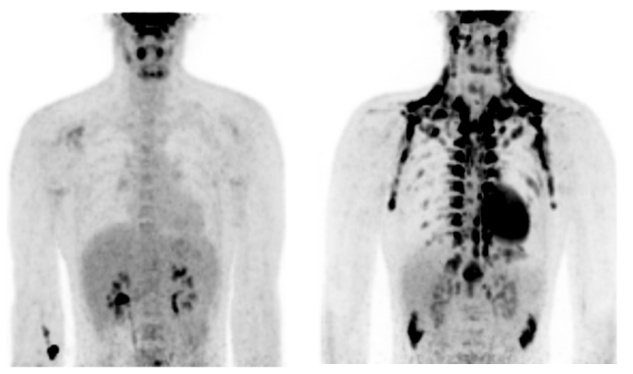 In een warme, thermoneutrale omgeving is het bruine vet niet actief (foto links). Tijdens blootstelling aan milde kou vindt actieve warmteproductie plaats in het bruine vet. Dit kan zichtbaar worden gemaakt door middel van PET/CT scanning.